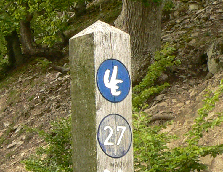 Urwaldsteig, Schild an der Mühlecke